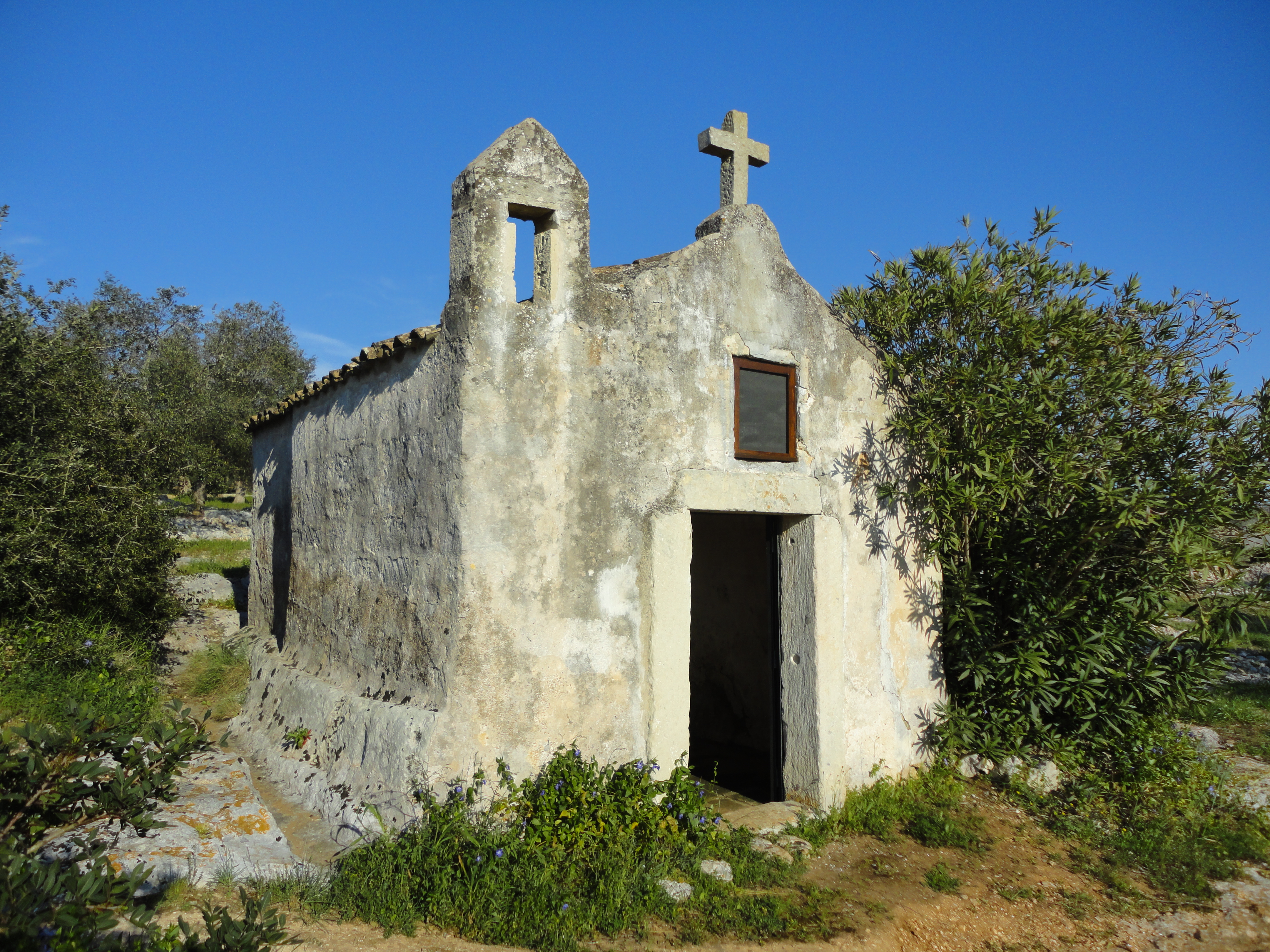 Chiesa Madonna del Monte Palmariggi, Lecce